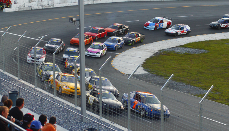 Course de voitures 4 cylindres à l'Autodrome Chaudière le 22 juin 2013 - Photo Paul-Émile Poulin-Jacques